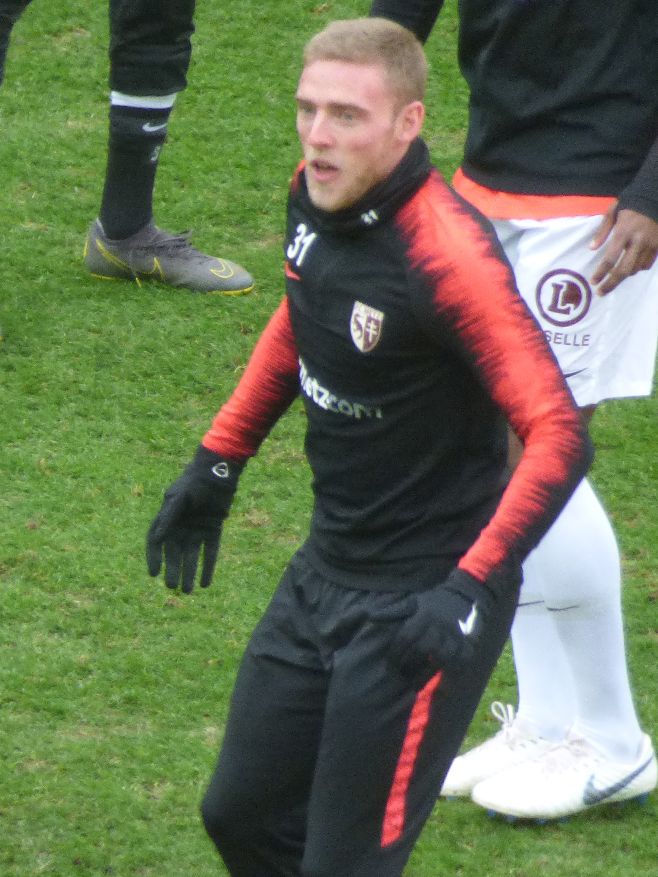 Laurent Jans avant le match RC Lens / FC Metz, comptant pour la vingt-quatrième journée du championnat de France de Ligue 2 2018-2019, le 9 février 2019, au Stade Bollaert-Delelis.